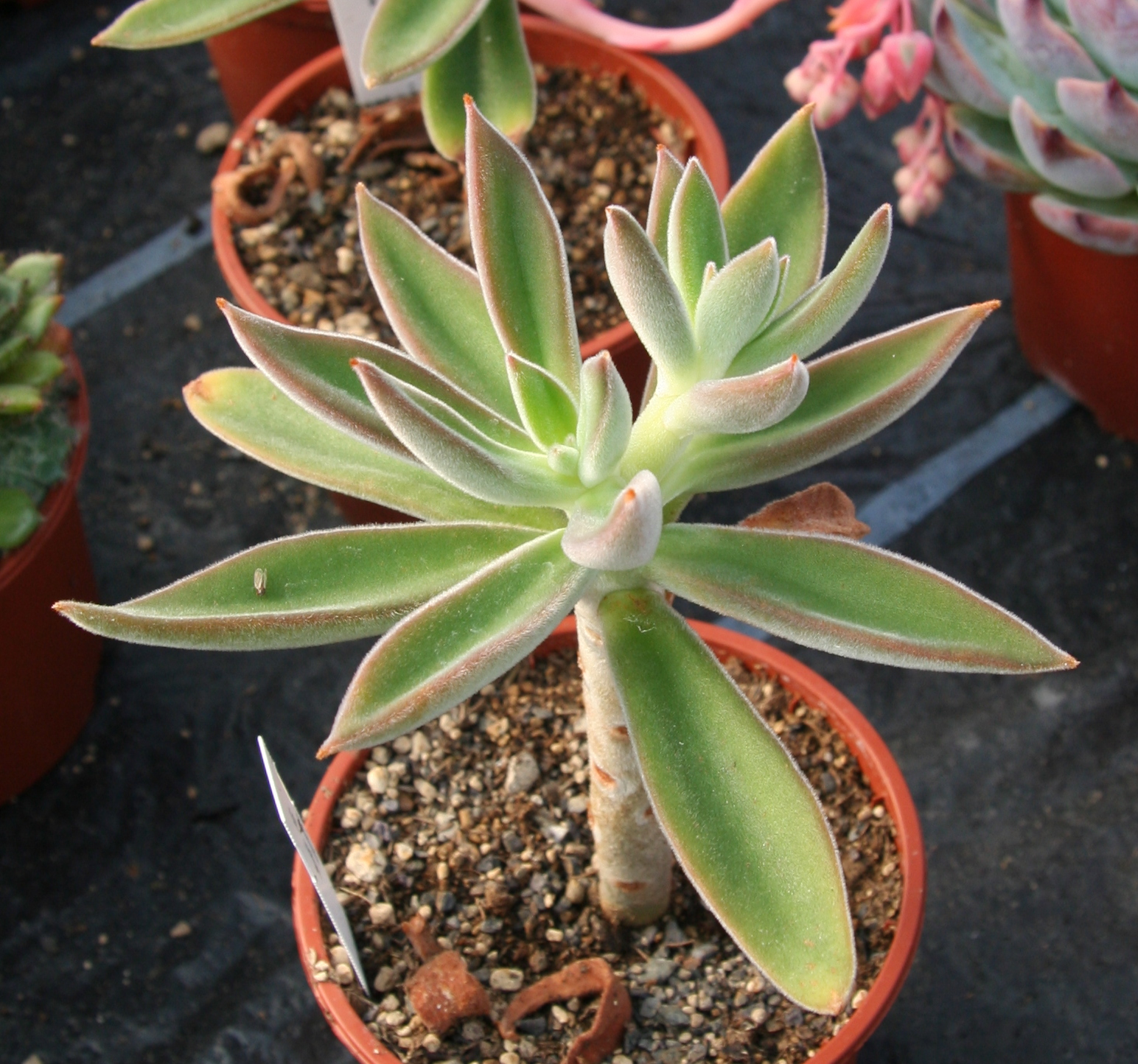 Echeveria coccinea in Kultur bei Kakteen-Haage in Erfurt